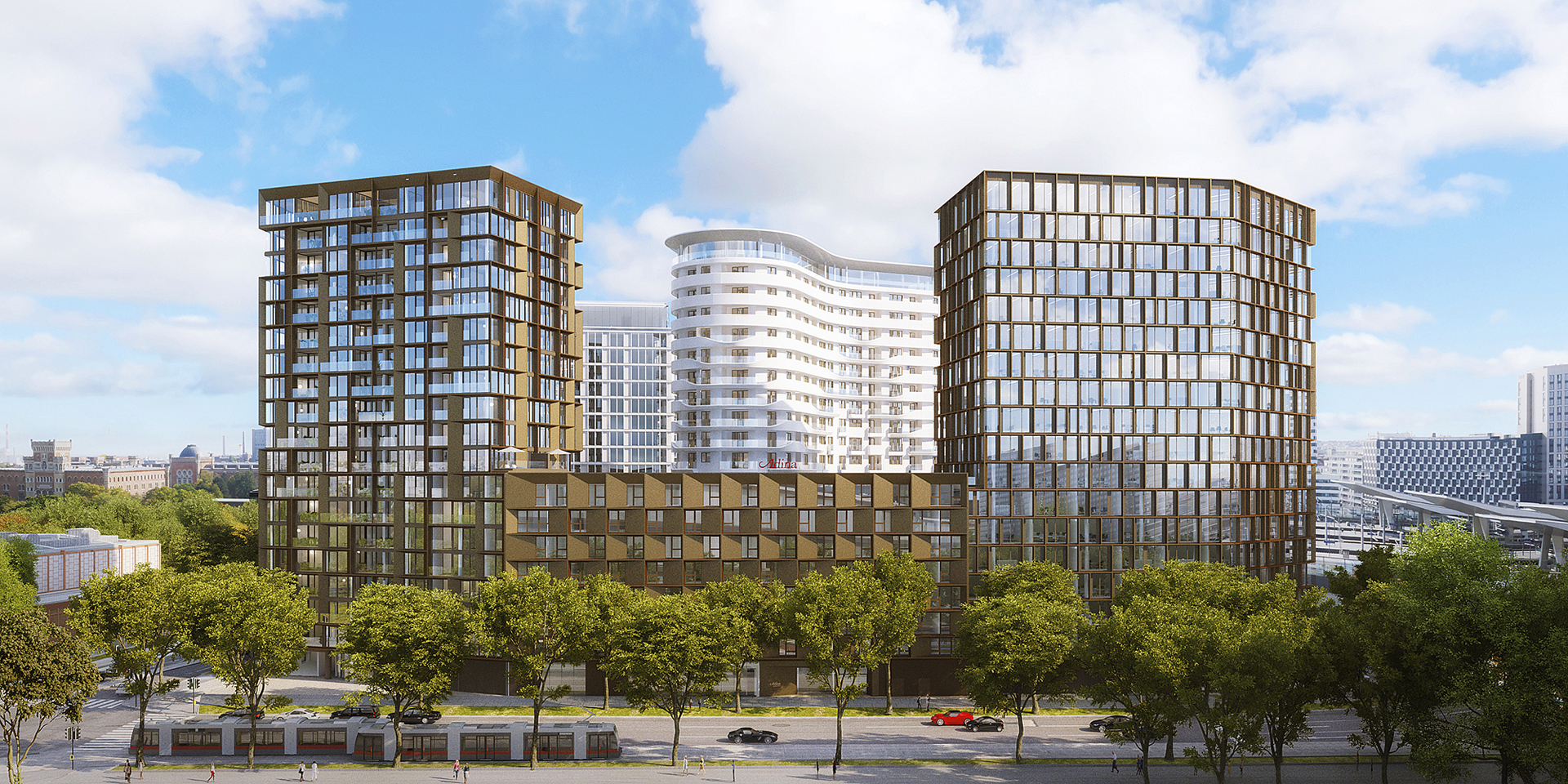 Blick auf das Gebäudeensemble Bel & Main Vienna